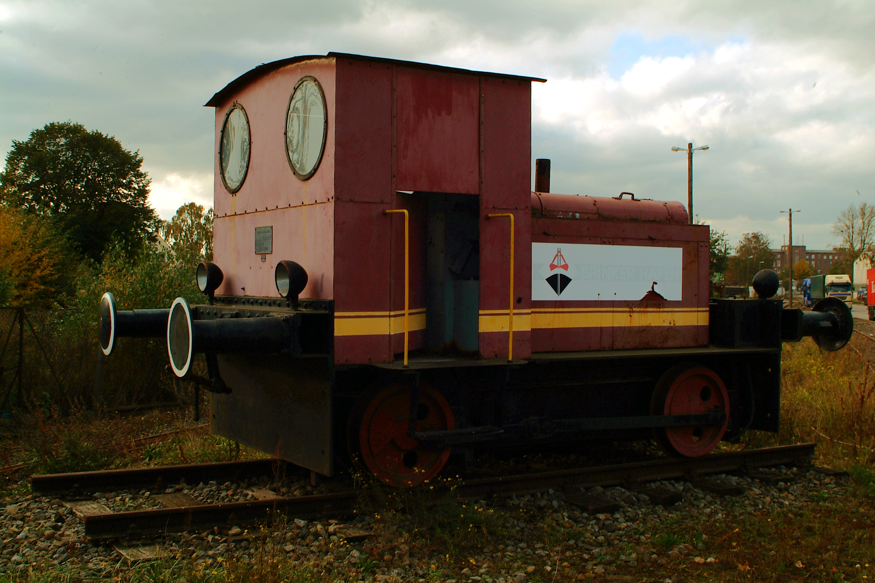 Brinker Hafenbahn Hannover, Zugmaschine der Ruhrthaler Maschinen-Fabrik Schwarz & Dykerhoff K.G. Mülheim Ruhr, 2371, Baujahr 1941/1942